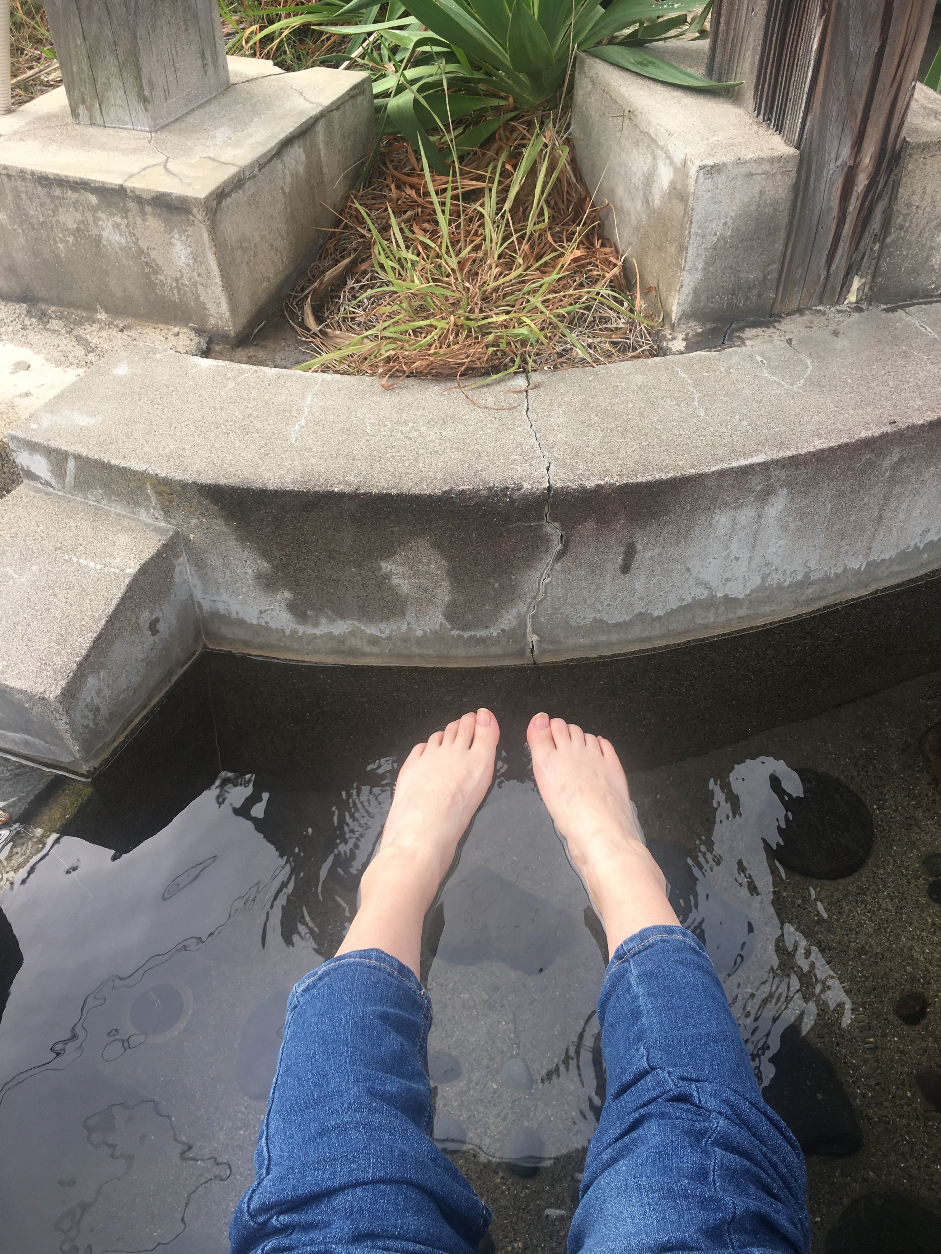 浅虫